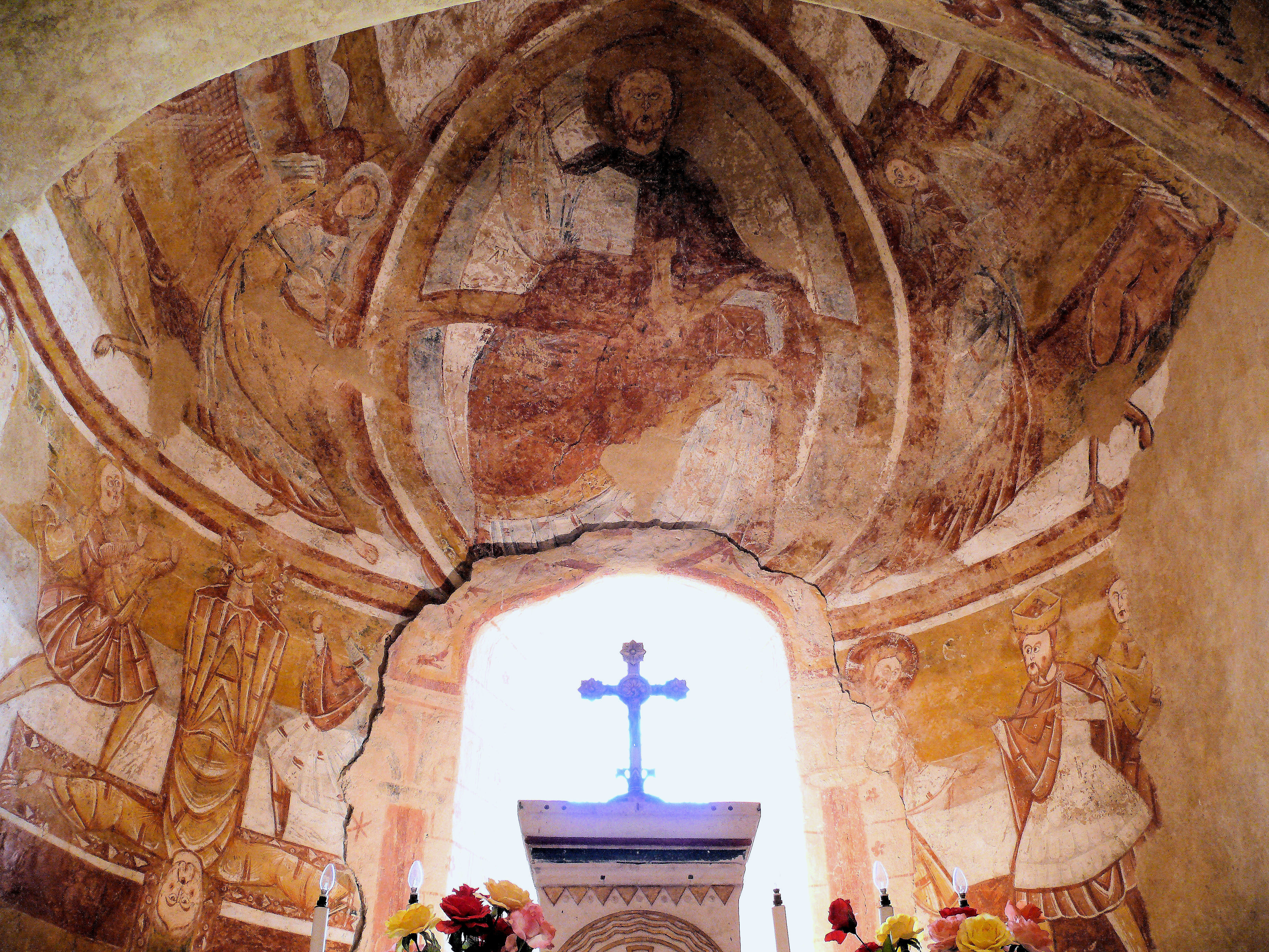 Vic - Eglise Saint-Martin - Fresques de l'abside du choeur